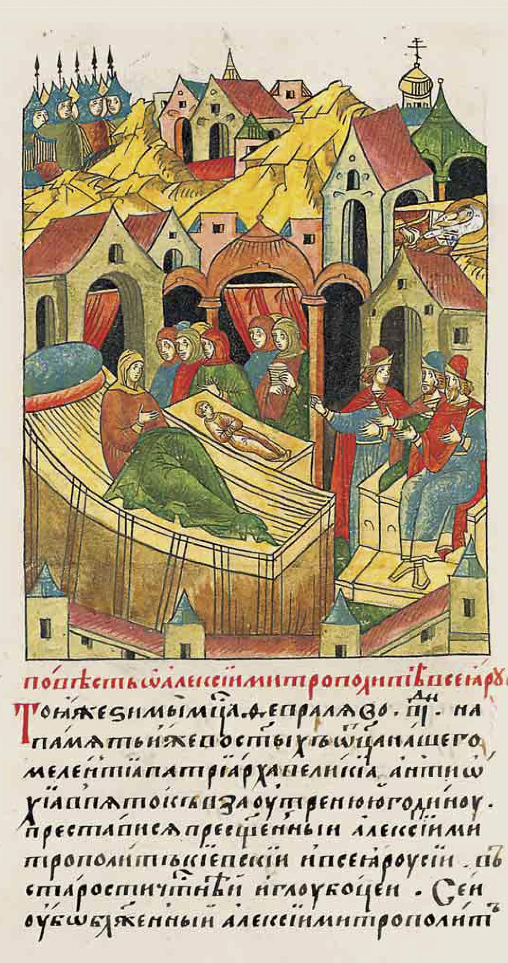 ЛИЦЕВОЙ ЛЕТОПИСНЫЙ СВОД Повесть об Алексии, митрополите всея Руси. В ту же зиму месяца февраля в 12 день, на память иже во святых отца нашего Мелентия, патриарха Великой Антиохии, в пятницу на заутрене преставился преосвященный Алексий, митрополит Киевский и всея Руси, доживший до старости. Этот блаженный Алексий